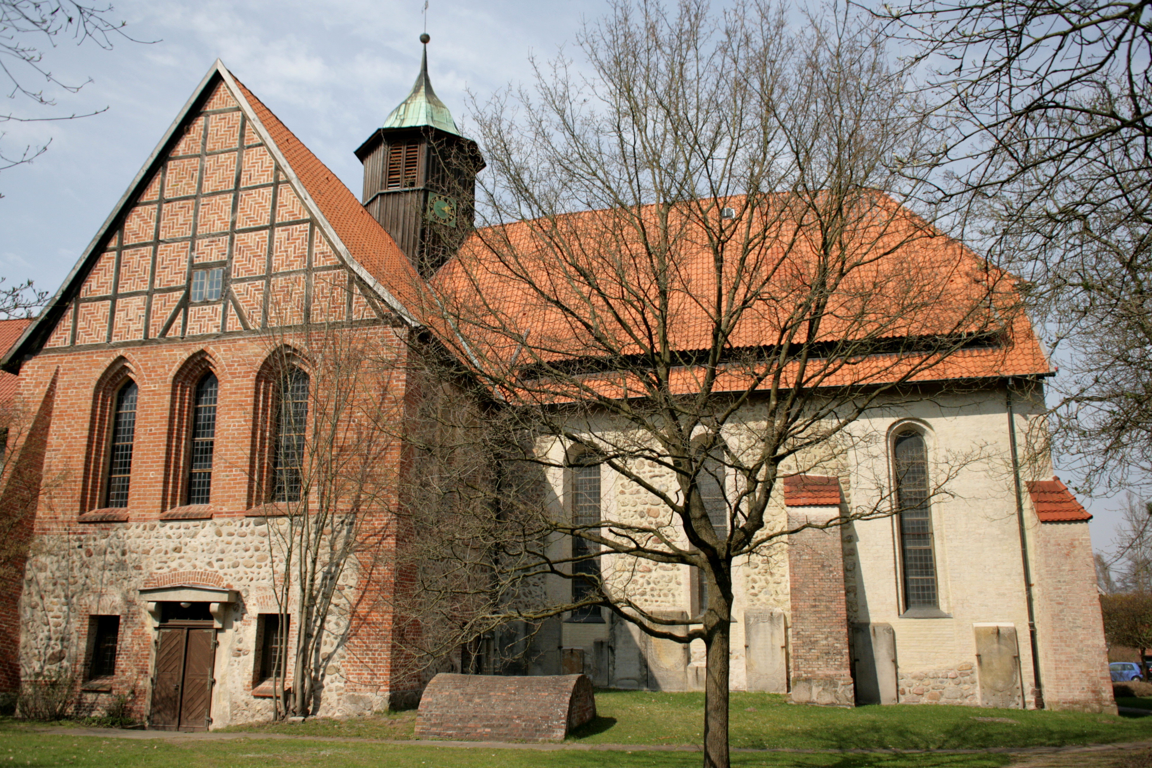 Klosterkirche, Am Alten Kreishaus in Oldenstadt, Uelzen